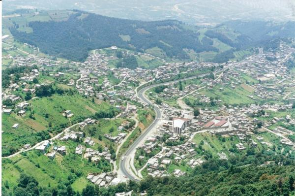 Vista panorámica de San Francisco Chimalpa